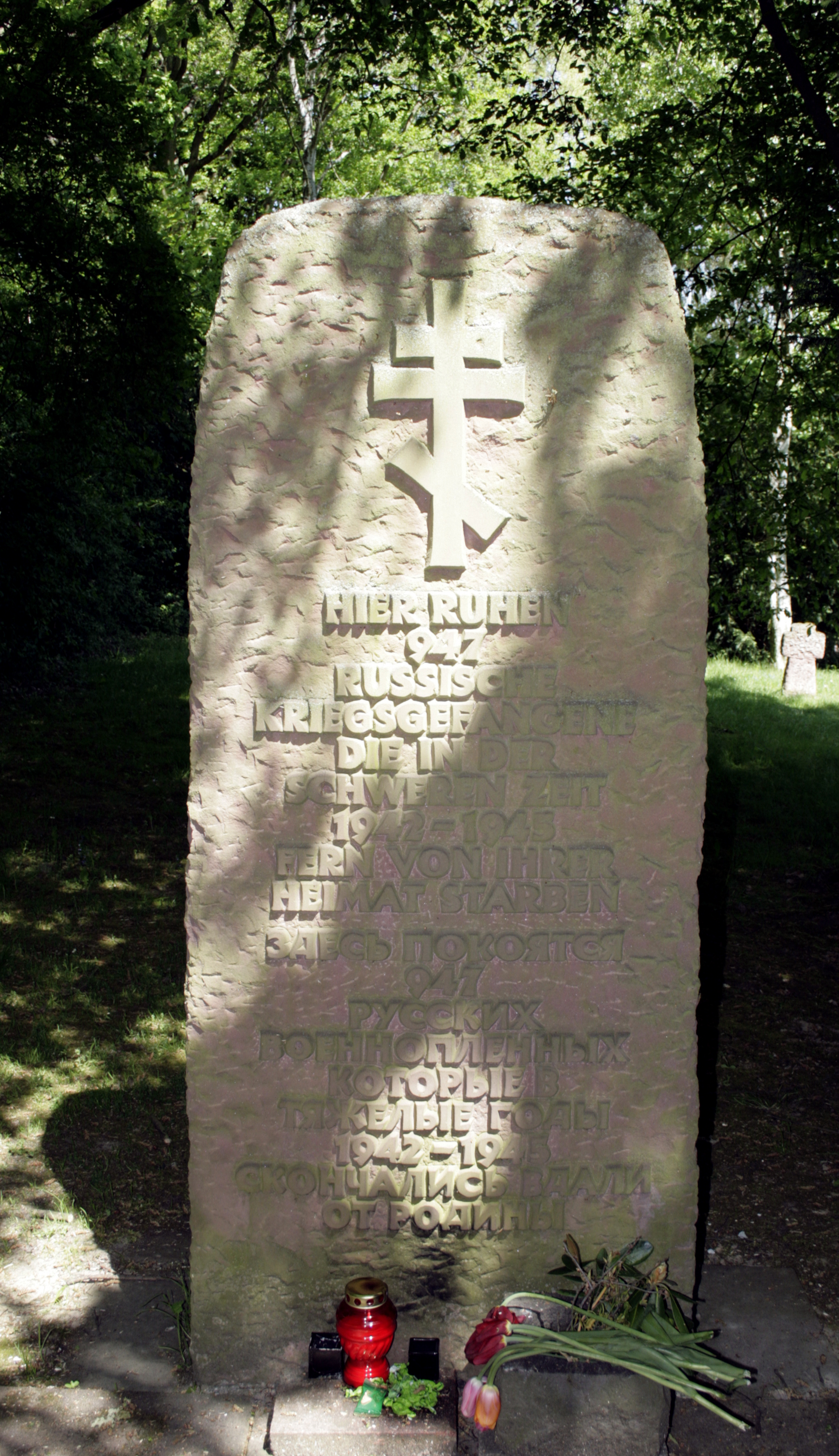 Gedenkstein auf dem Soldatenfriedhof in Dietkirchen, Deutschland, zur Erinnerung an russische Kriegsgefangene im Zweiten Weltkrieg